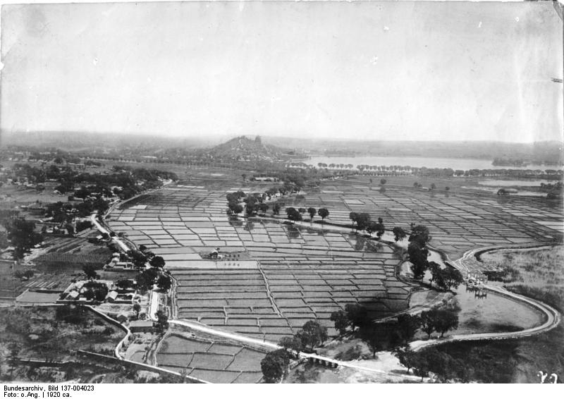 Reisfelder bei Peking.